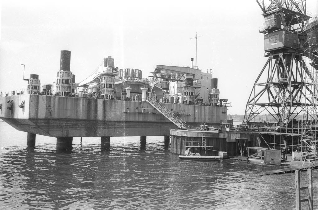 bei Ausrüstungsarbeiten im Werk Dietrichsdorf der Howaldtswerke.